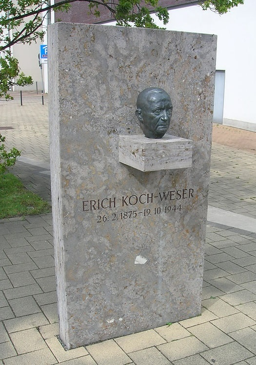 Denkmal für Erich Koch-Weser in Bremerhaven; eingeweiht am 19. Oktober 1986 auf dem Platz zwischen dem Stadttheater und dem damaligen Stadtbad.